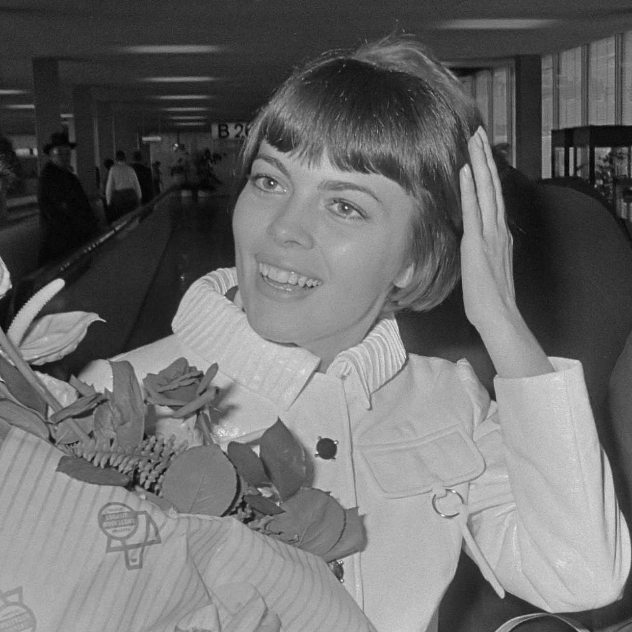 Franse zangeres Mireille Mathieu met grond stewardess in elektronisch karretje op Schiphol